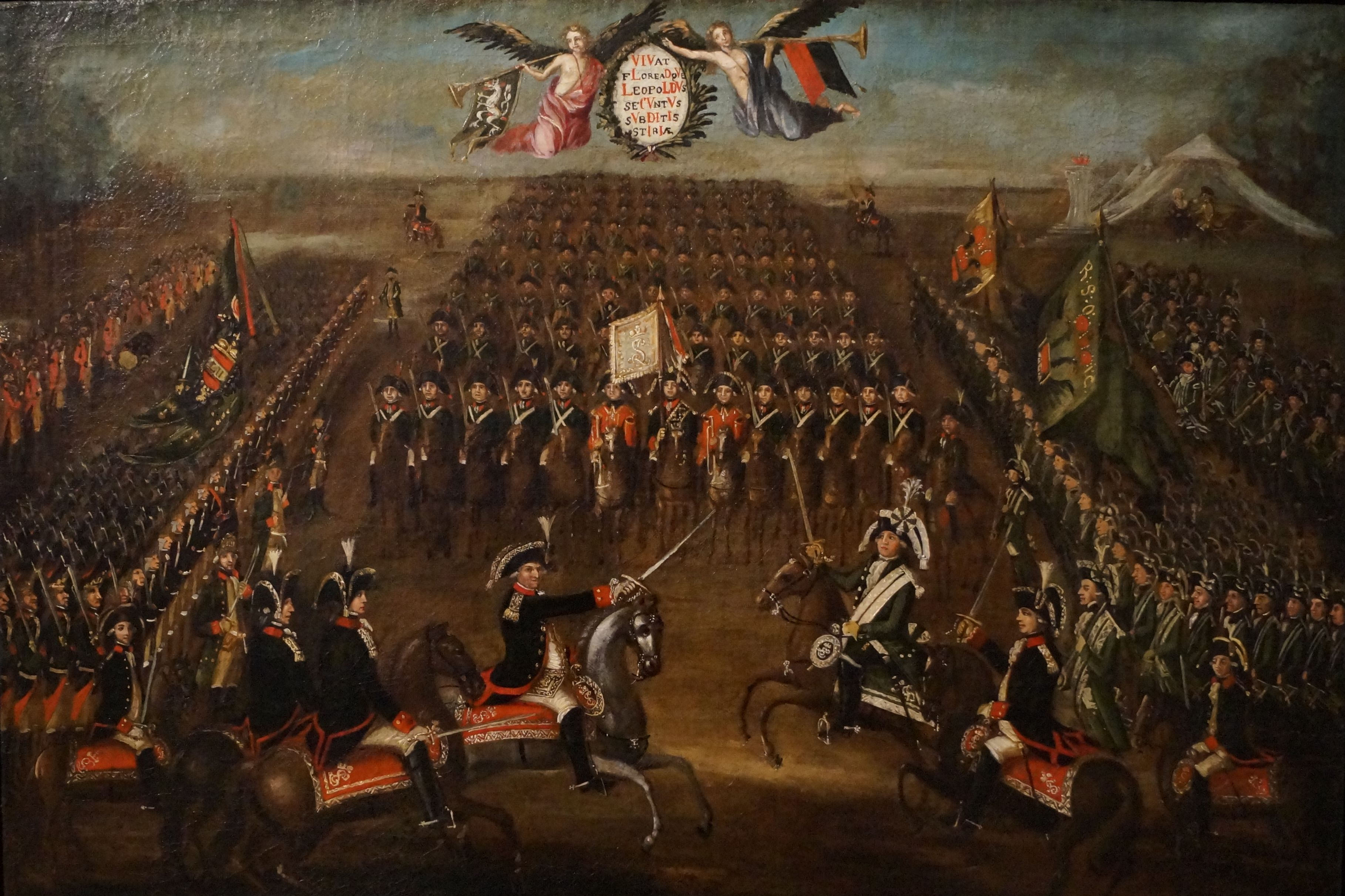 Die historische Schausammlung und Dauerausstellung „360GRAZ | Die Stadt von allen Zeiten“ zeigt die politische, wirtschaftliche und soziale Geschichte der Stadt Graz in einer offenen Form. In diesem thematisch und chronologisch geordneten Schaudepot wird die Geschichte von Graz dargestellt.